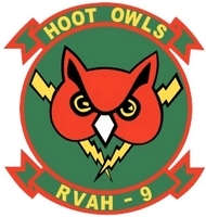 RVAH-9 insignia